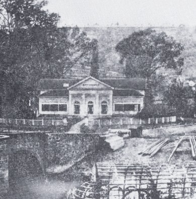 Das Schützenhaus in Meiningen vor dem Umbau von 1863, heute Volkshaus.